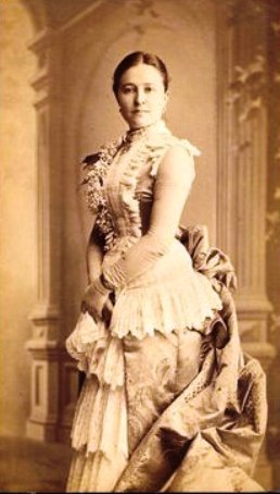 Jászai Mari (1850-1926) 32 éves korában